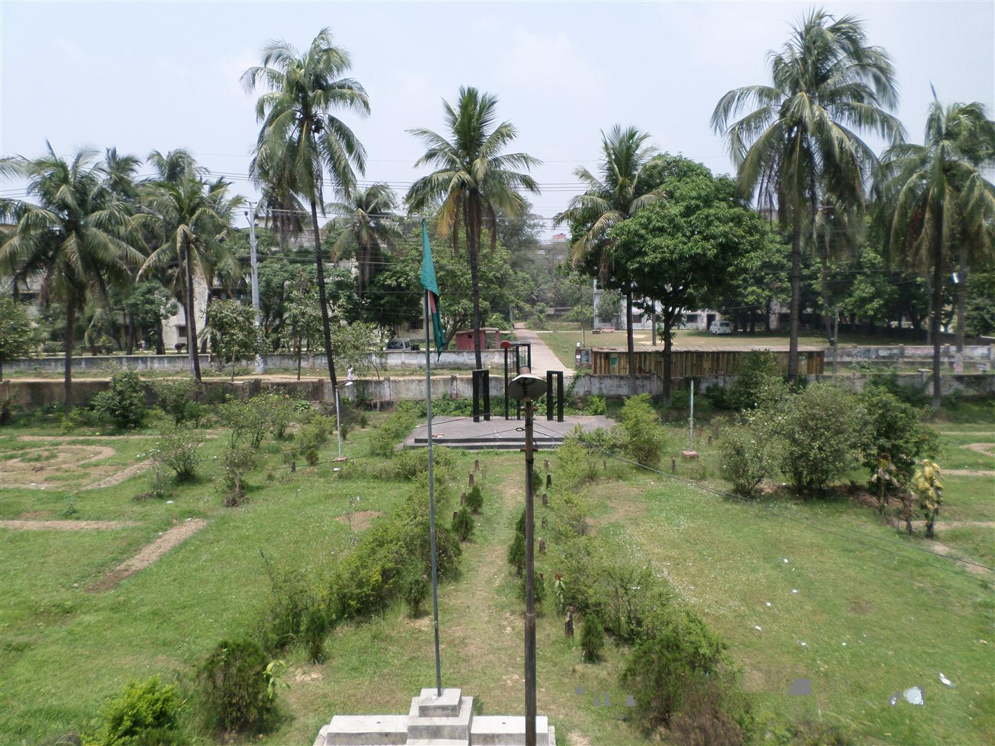 চট্টগ্রাম পলিটেকনিক ইনস্টিটিউটের একাংশ